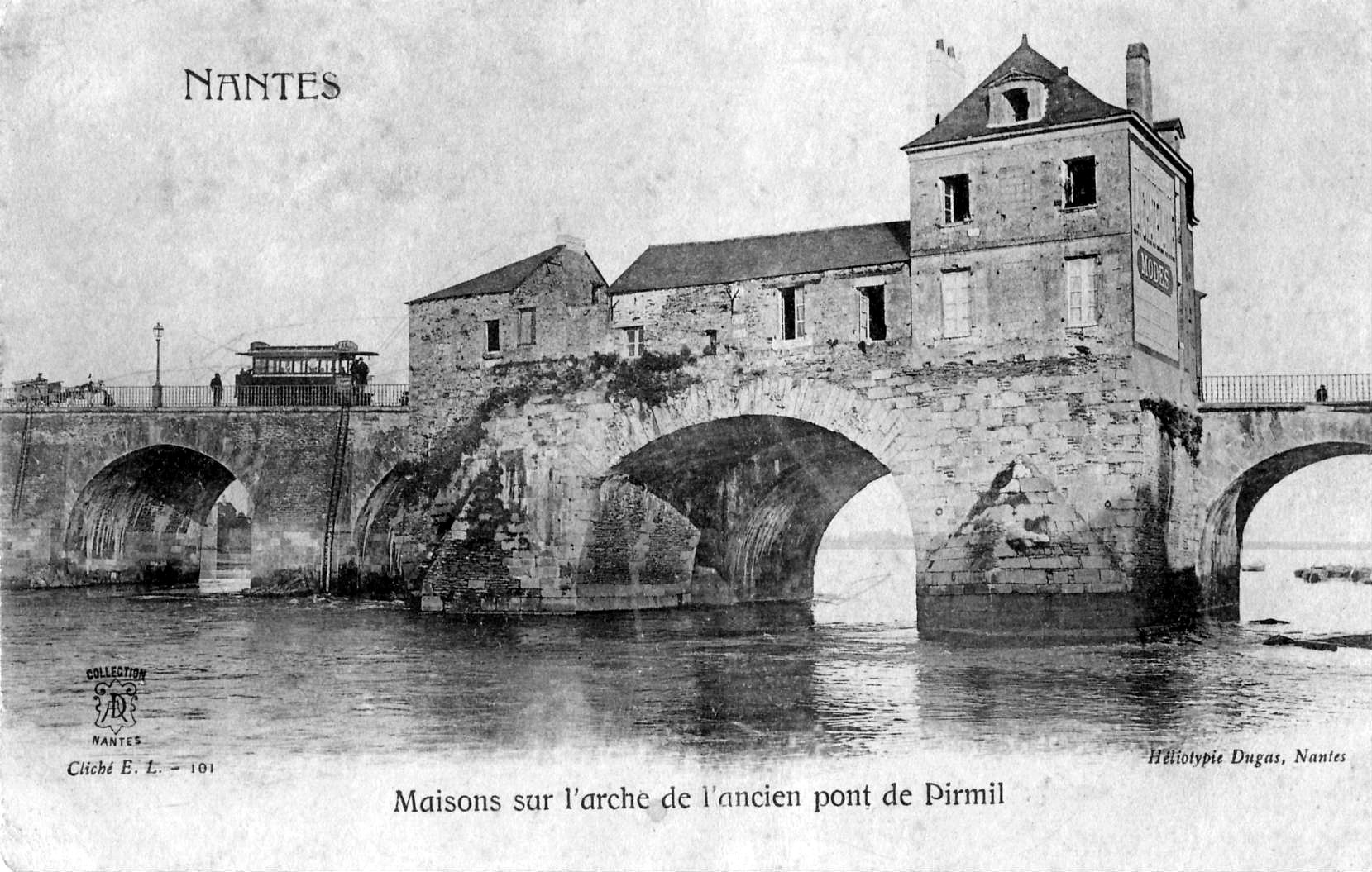 Carte postale ancienne éditée par Héliothypie Dugas à Nantes, collection DA, cliché E.L. n°101 : NANTES - Maisons sur l'arche de l'ancien Pont de Pirmil